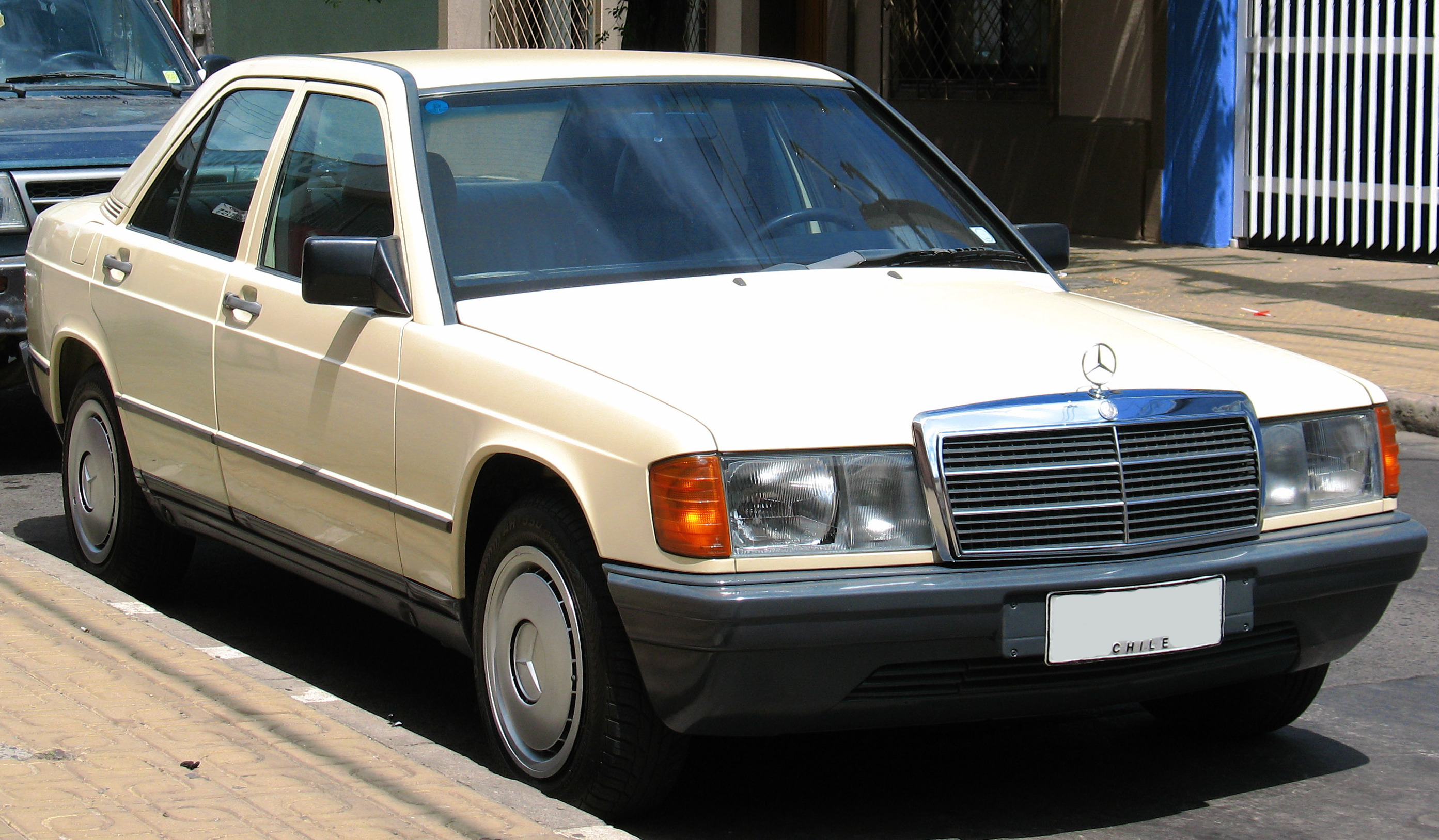 Mercedes Benz 190 D 2.5 1987